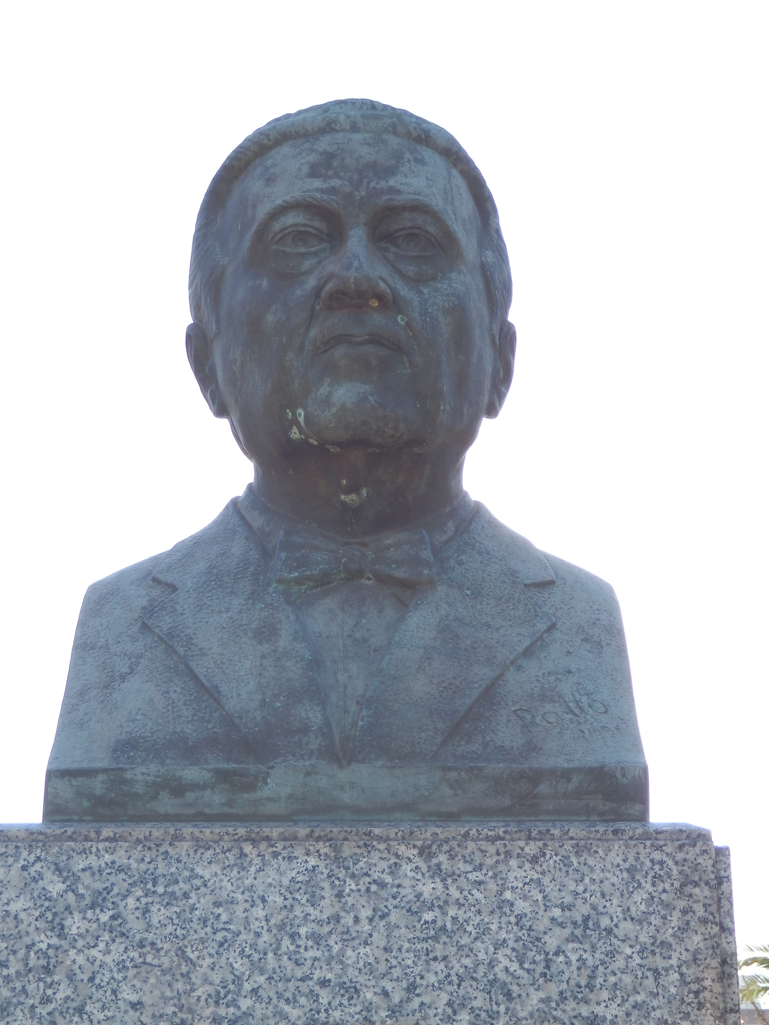 Busto de Antonio Beltrán Martínez.